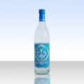 Peshterska Mastika, eines der beliebtesten Anisgetränke Bulgariens.